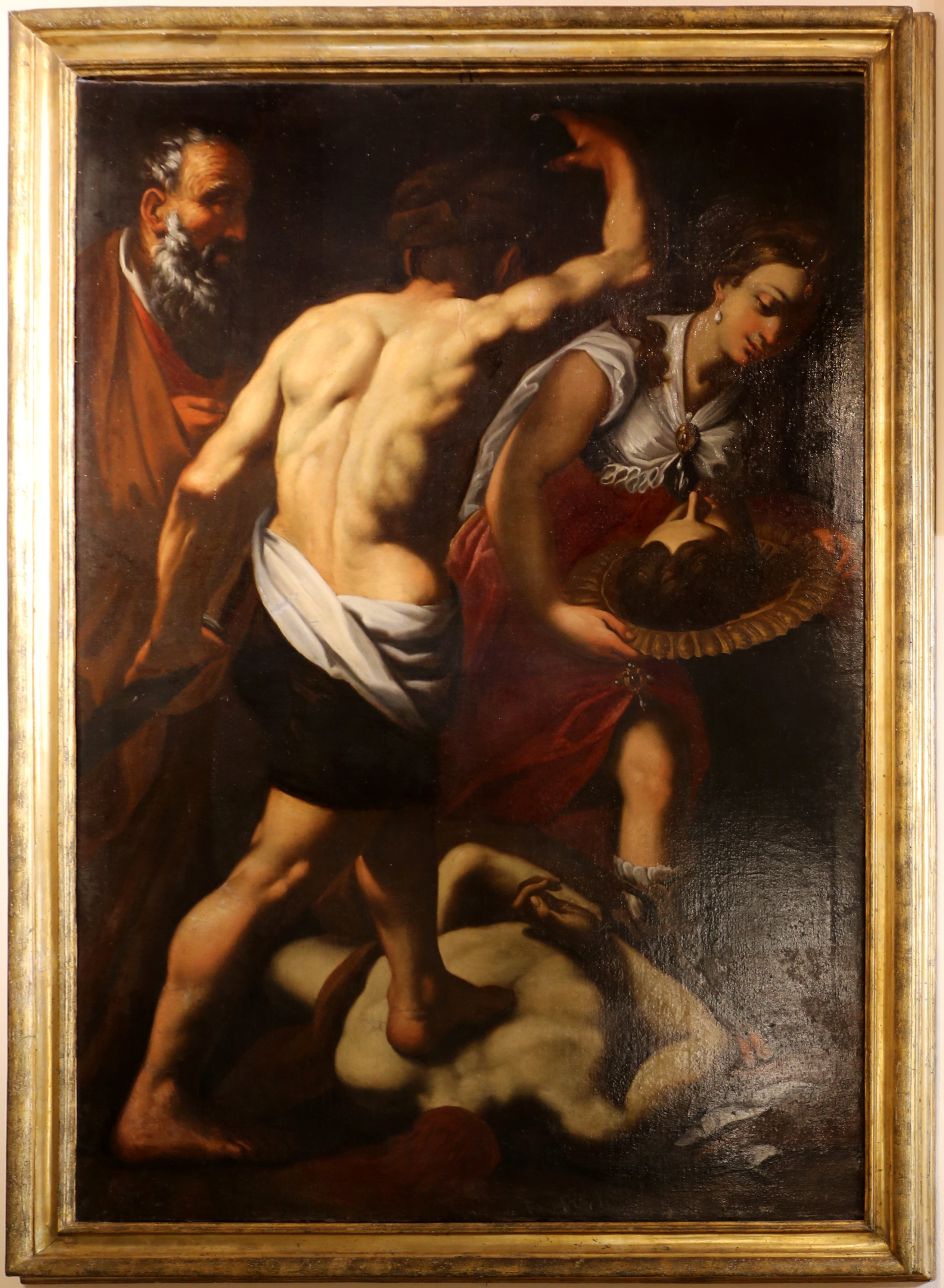 Museo civico di Montepulciano This is a photo of a monument which is part of cultural heritage of Italy.